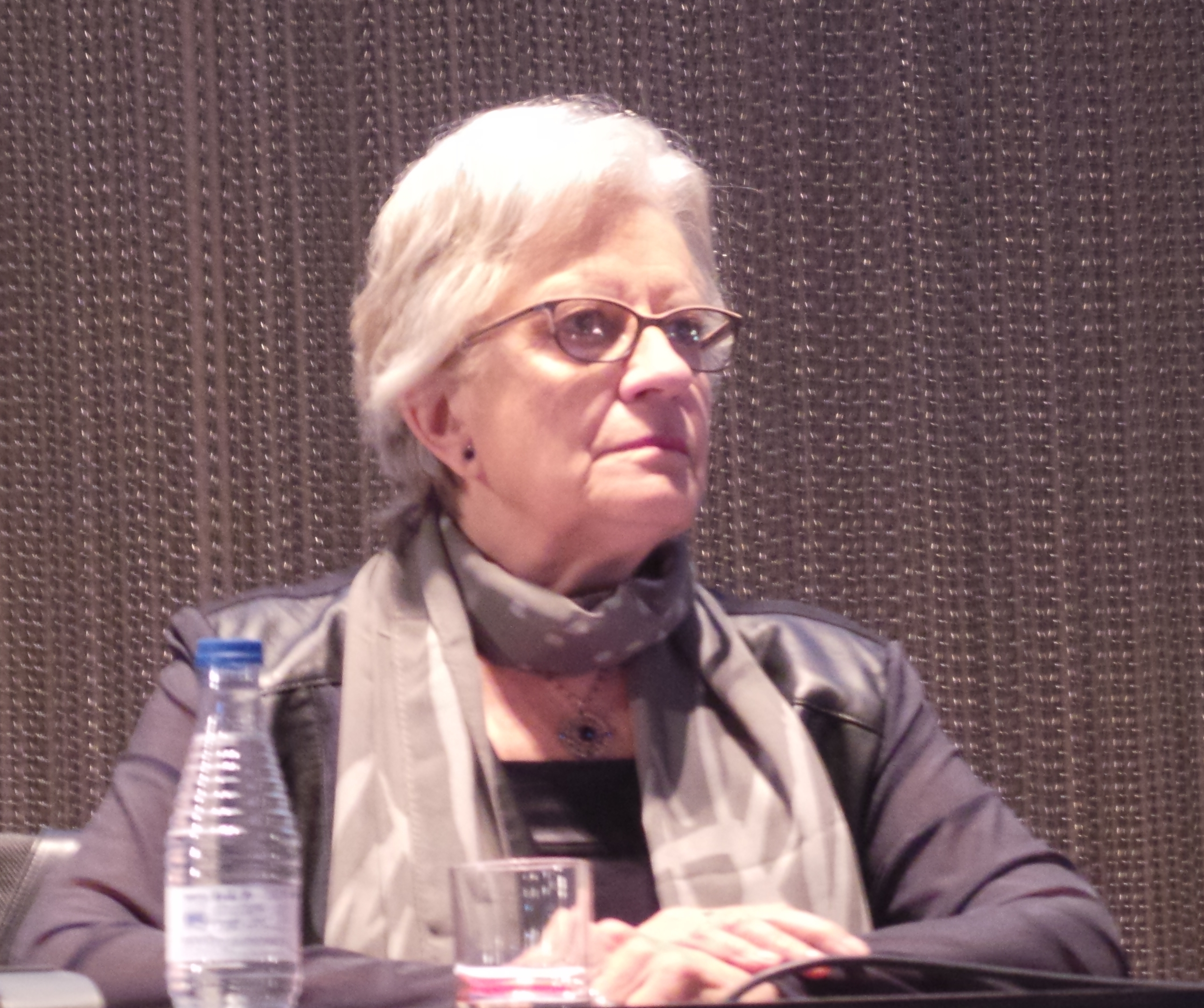 Gijón, Asturias 2016